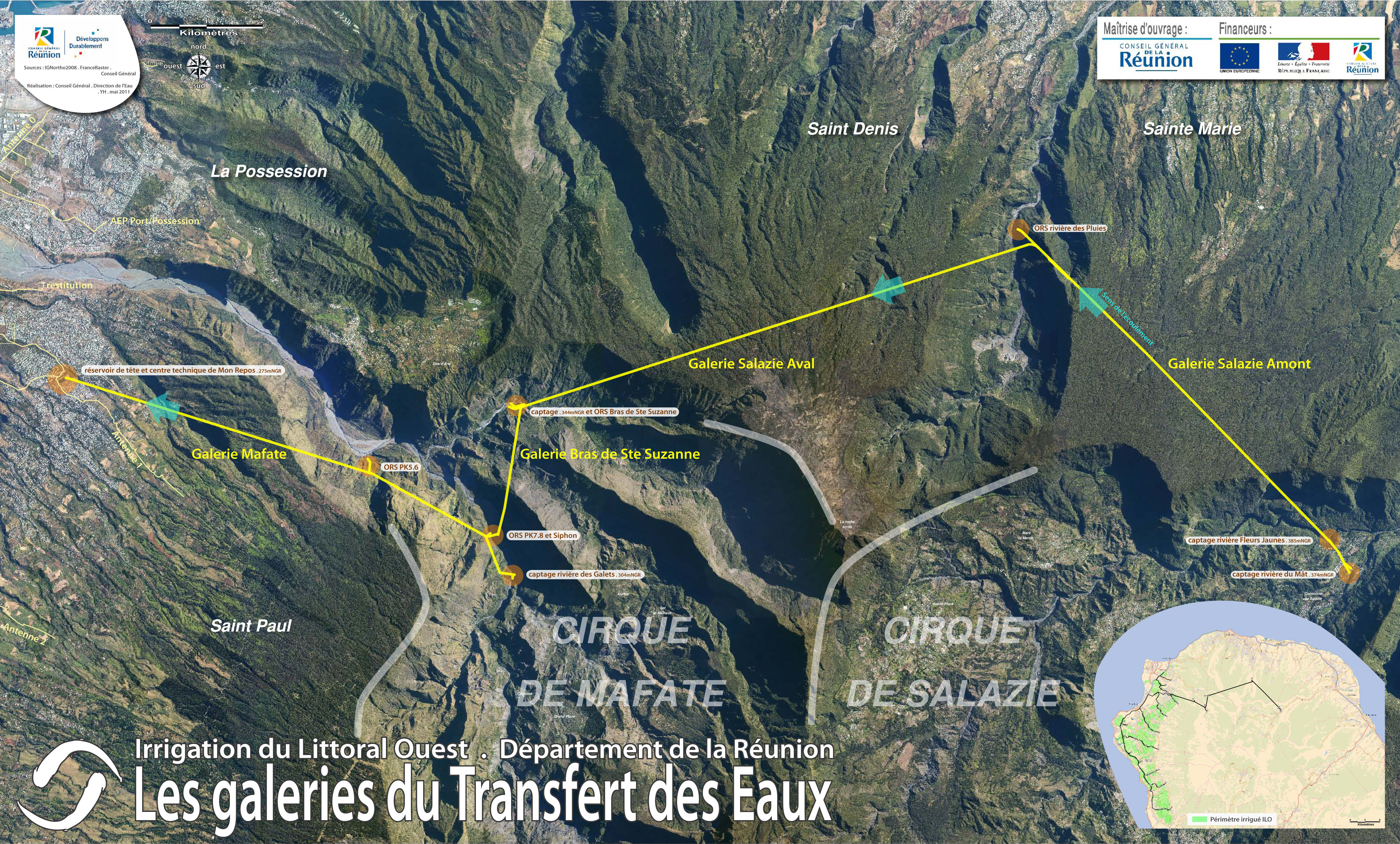 Présentation sur orthophotoplan du tracé des galeries souterraines du Transfert des Eaux (Grand Projet de travaux Irrigation du Littoral Ouest)